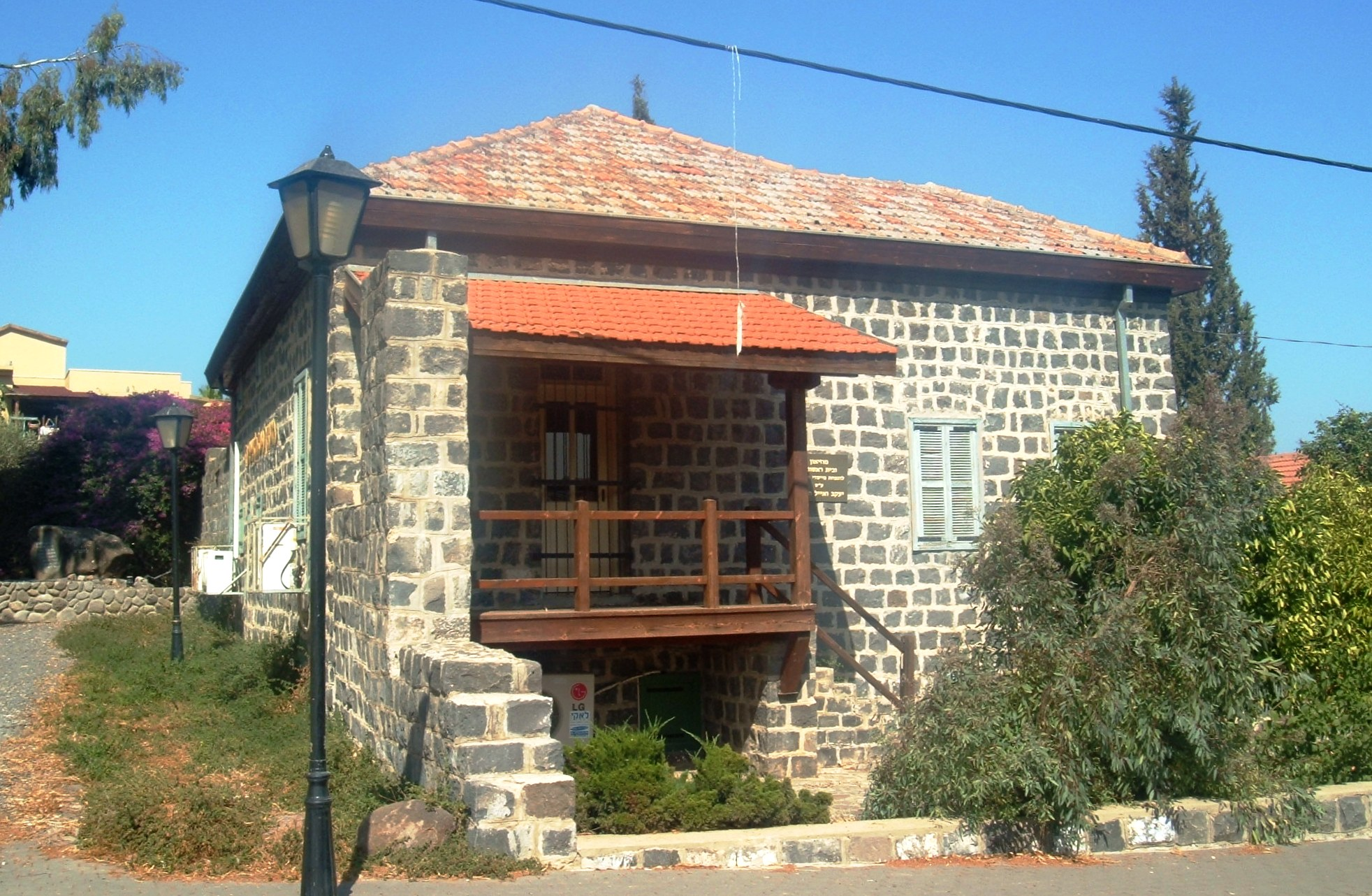 "Founders House" museum in Migdal, Israel. מוזיאון "בית המייסדים" במגדל